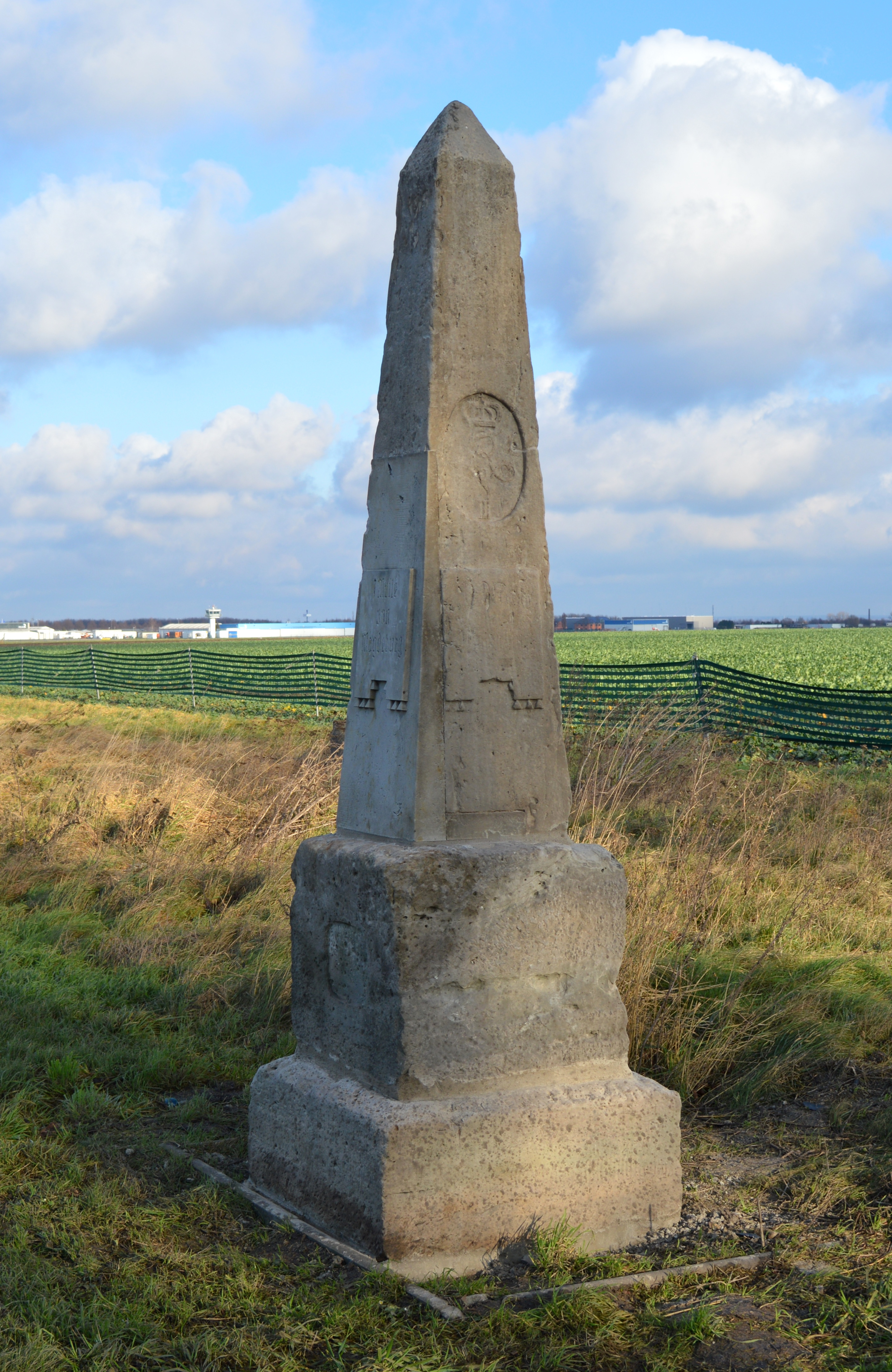 Meilensäule Beyendorfer Grund